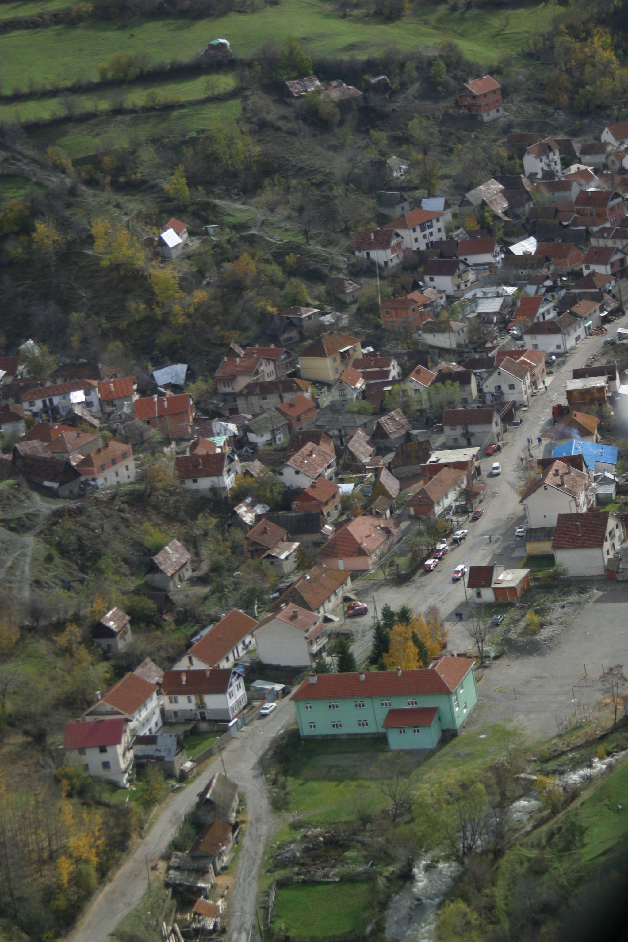 Selo Kruševo